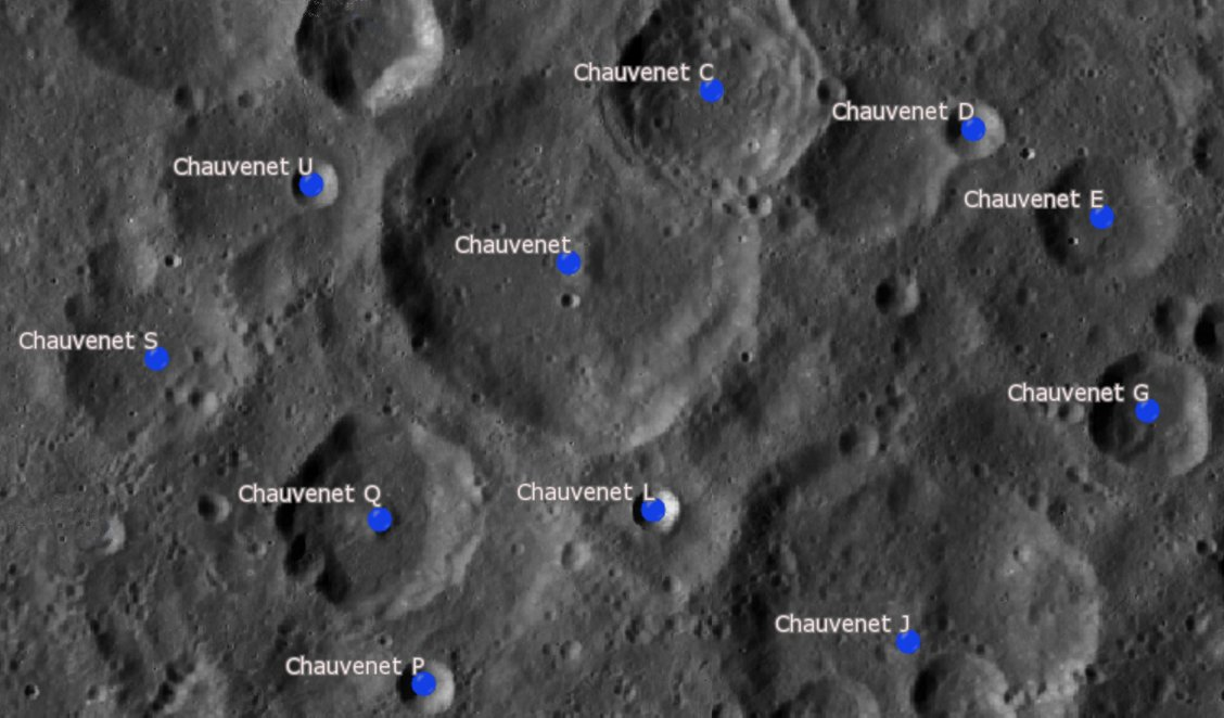 Cráter Chauvenet (LRO)